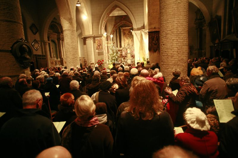 Célébration de Noël à la Collégiale